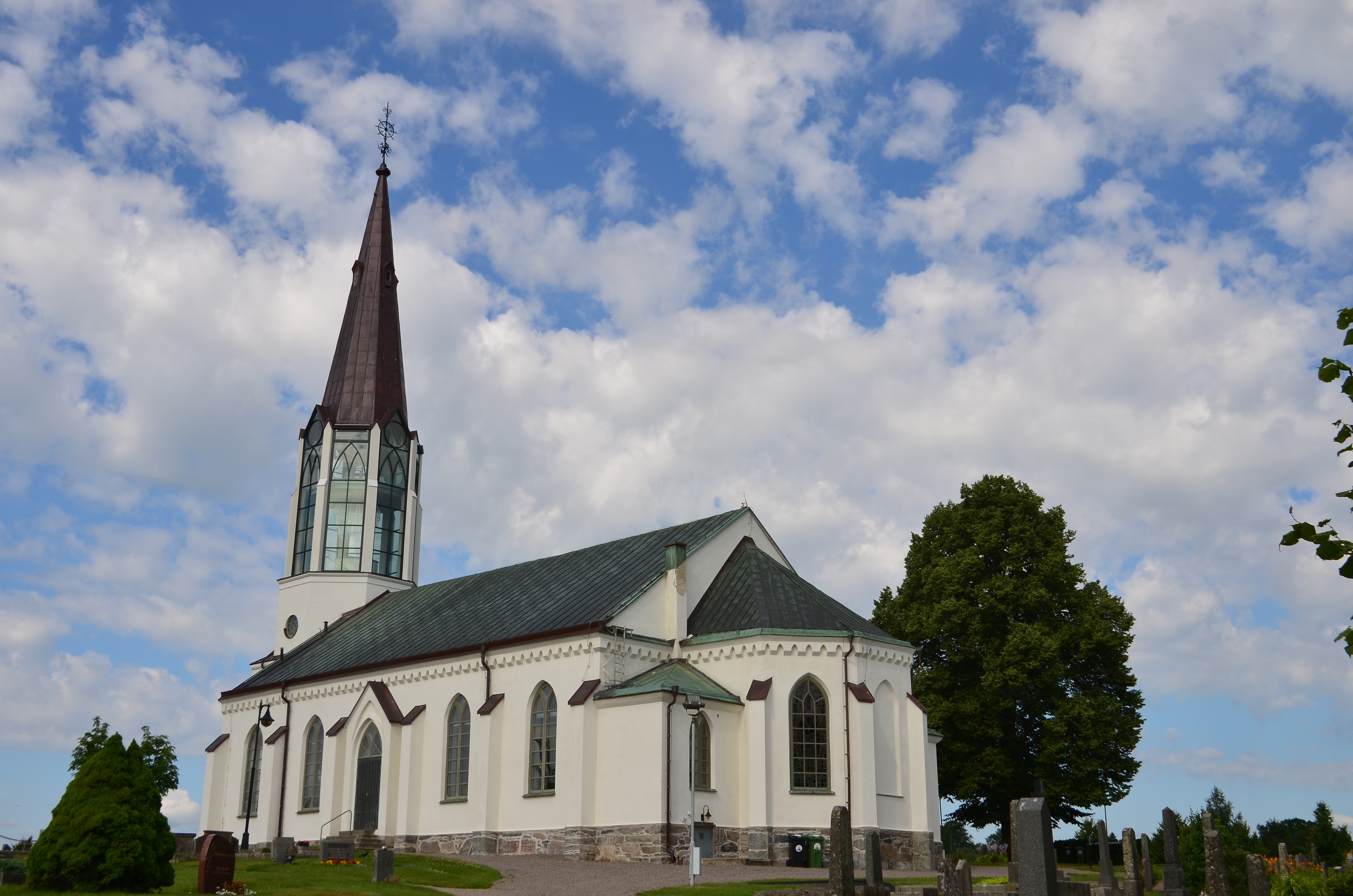 Skallsjö kyrka (Floda 10:1)